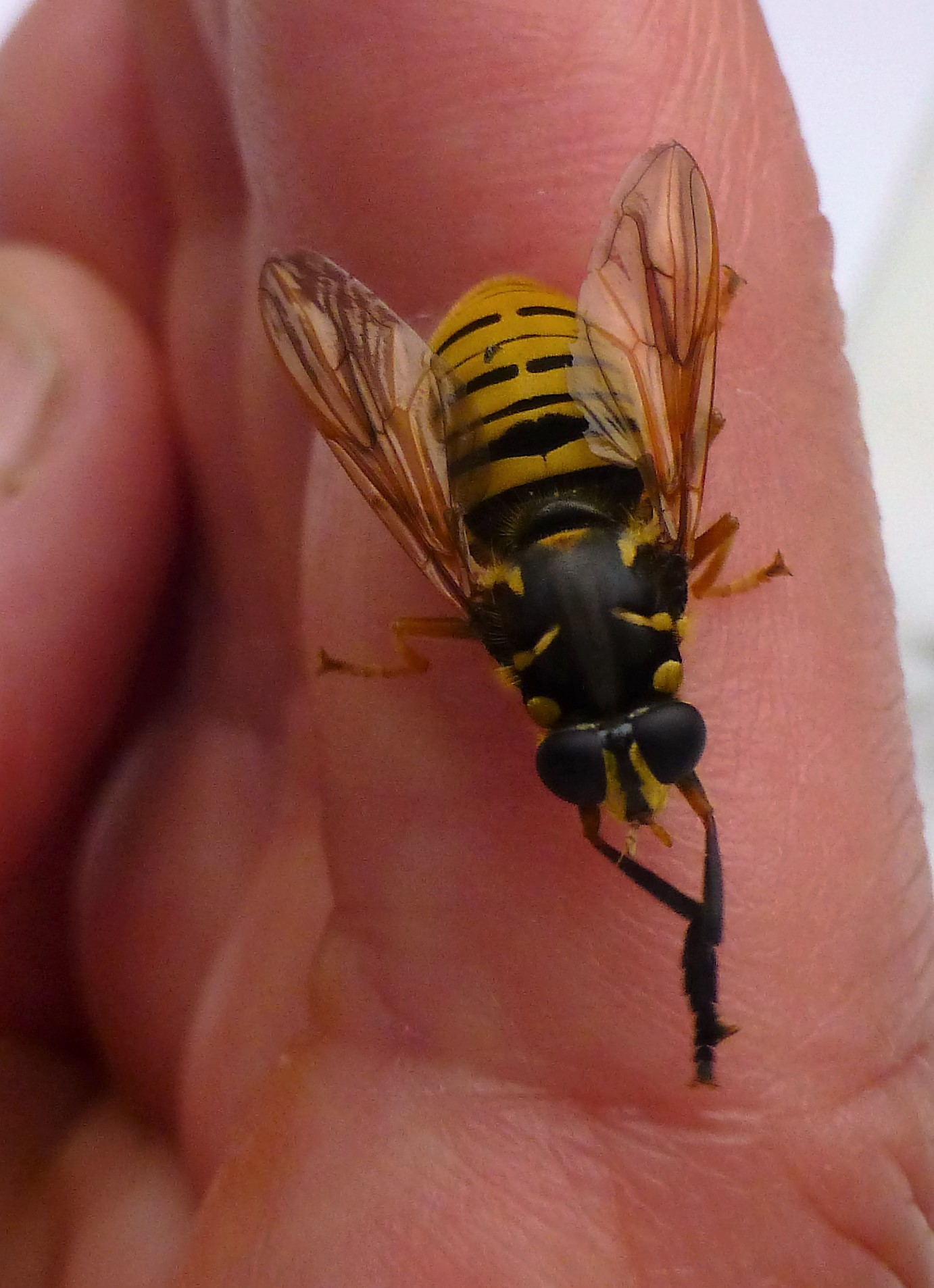 Temnostoma vespiforme diptère inoffensif à sa toilette Mons, Hainaut Belgique